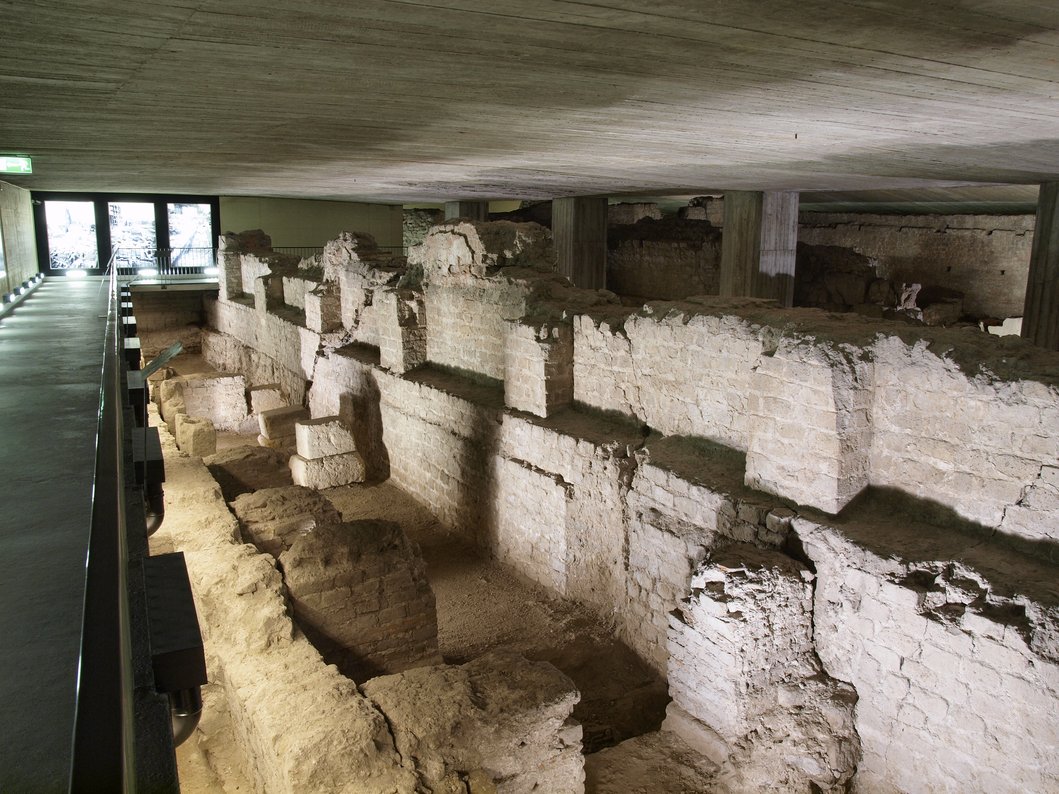 Reste des römischen Statthalterpalasts